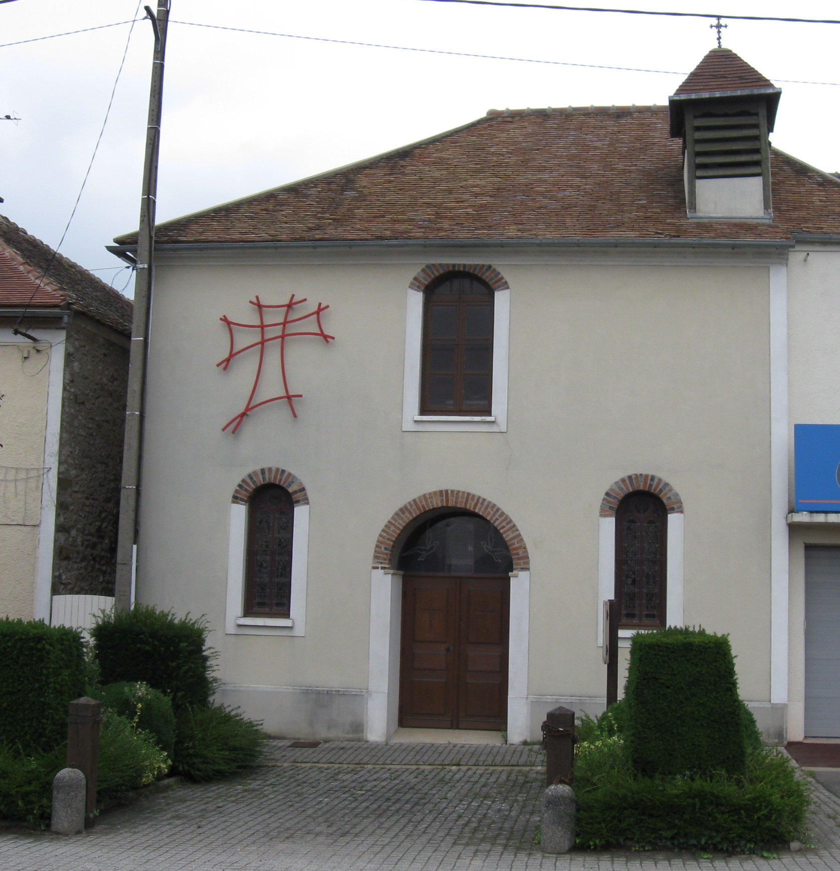 Chapelle de Pamfou. (Seine-et-Marne, région Île-de-France).